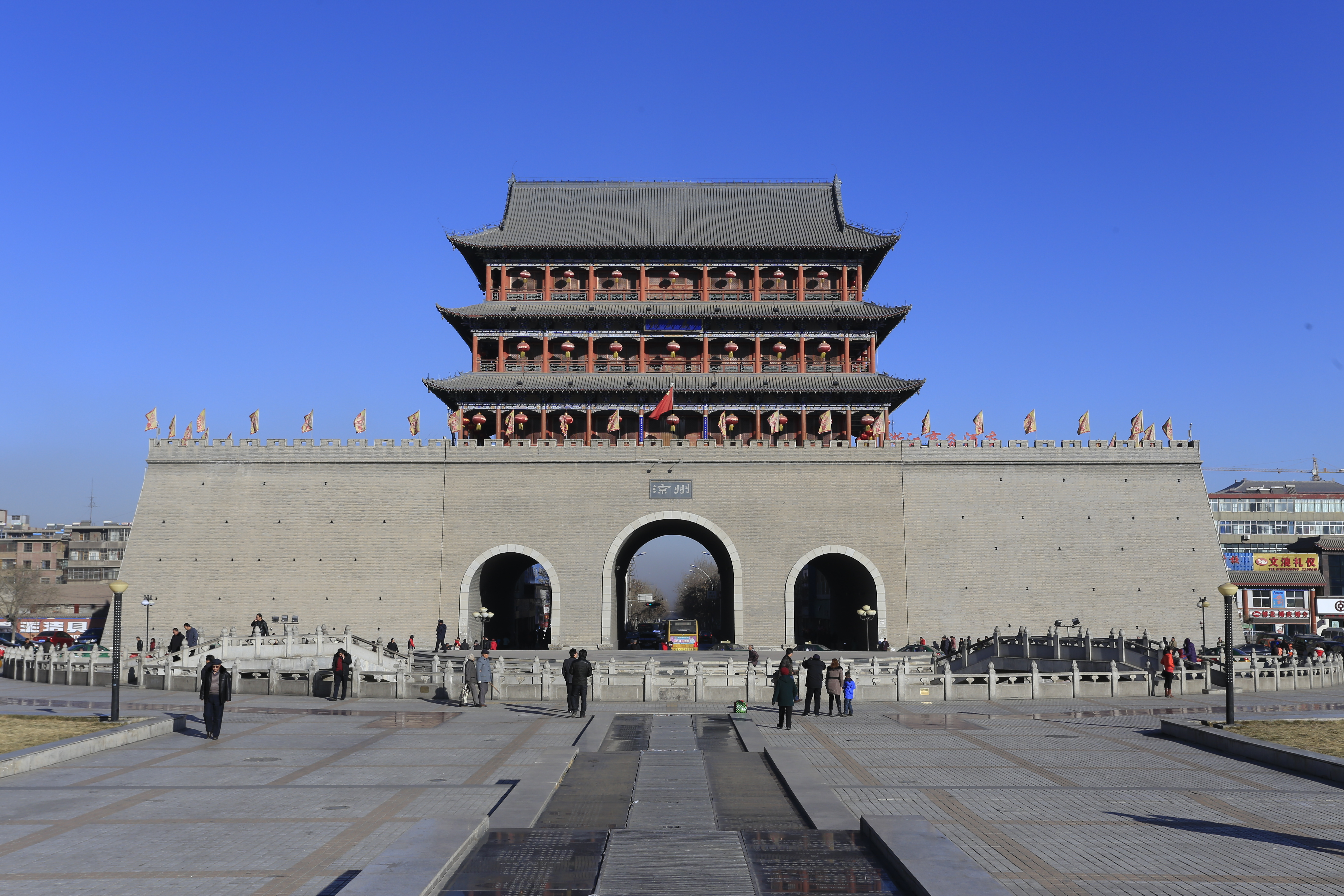 武威南城门